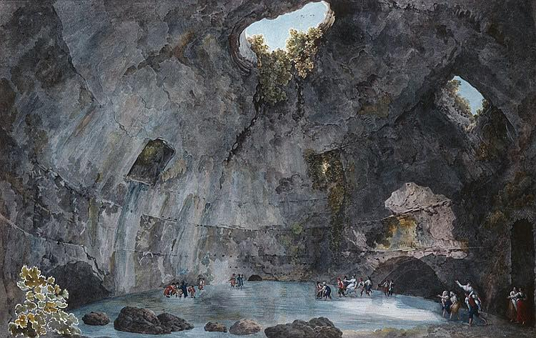 Abraham-Louis-Rodolphe Ducros - Baia, interno del cosiddetto Tempio di Mercurio. Visitatori. Musée cantonal des beaux-arts, Lausanne.